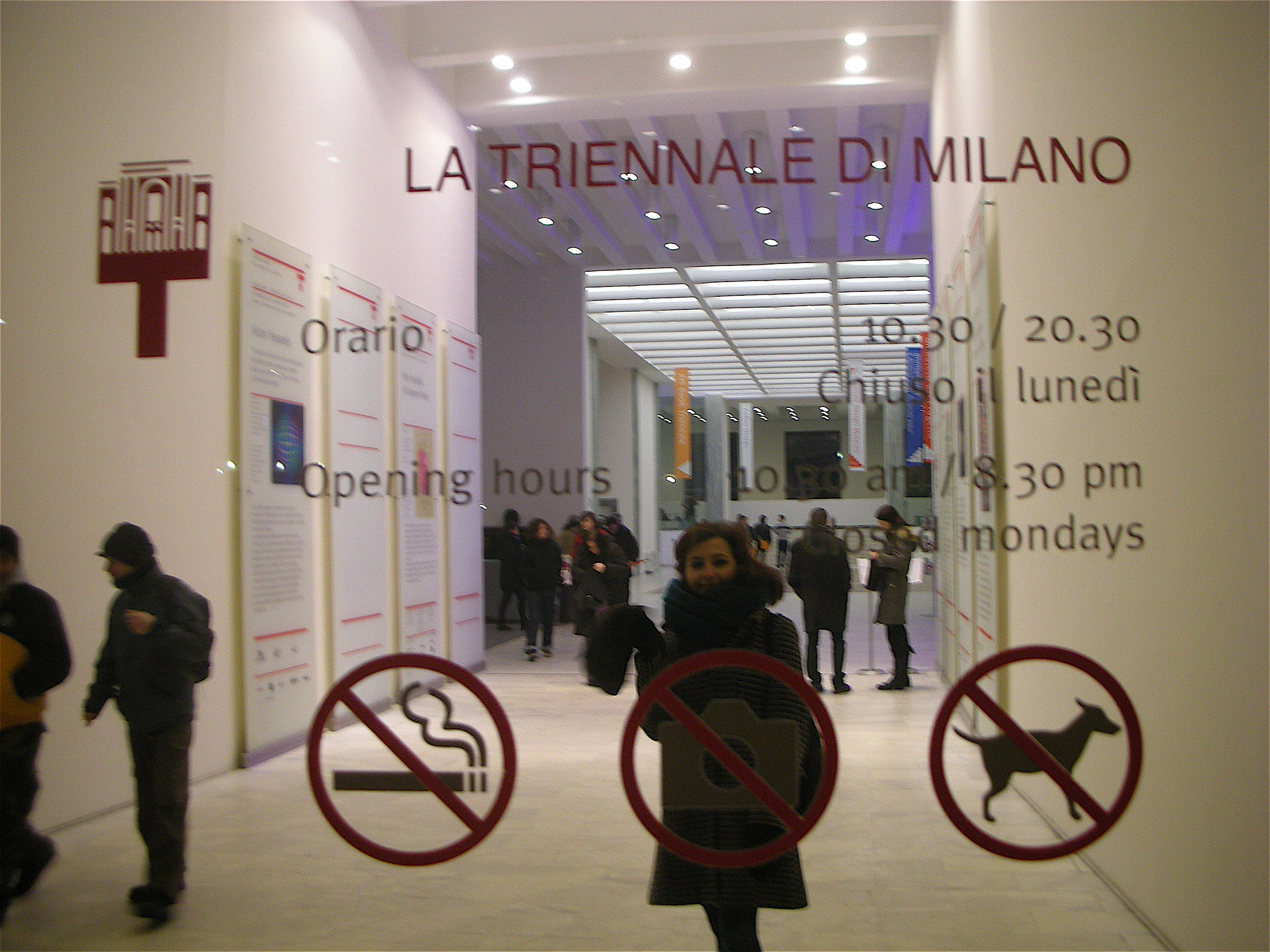 L'entrata della Triennale di Milano - Italia.